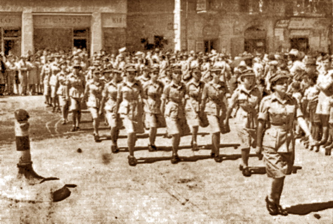 חיילות חיל העזר לנשים צועדות בירושלים.